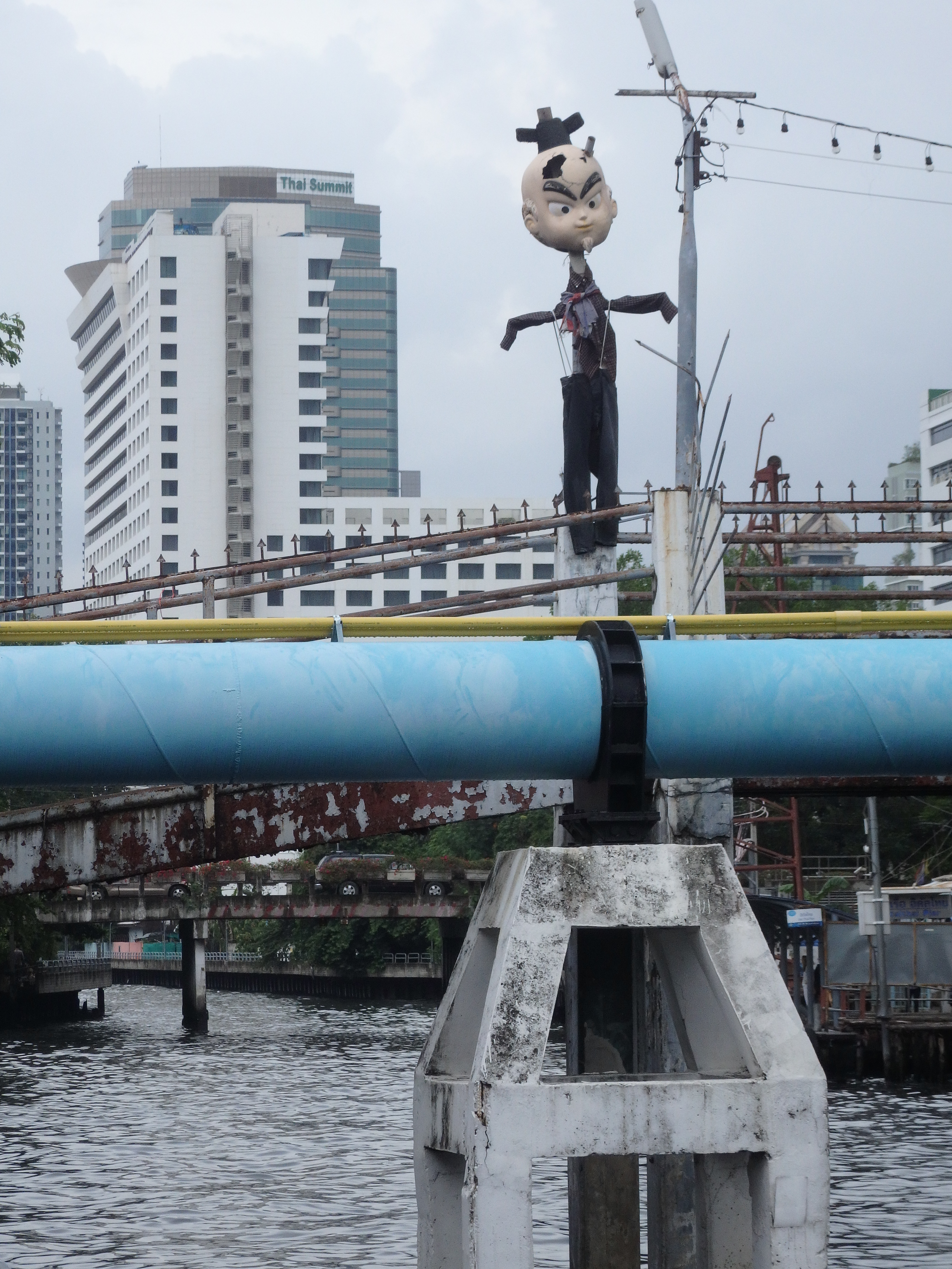 Khlong Tan Nuea, Watthana, Bangkok 10110, Thailand